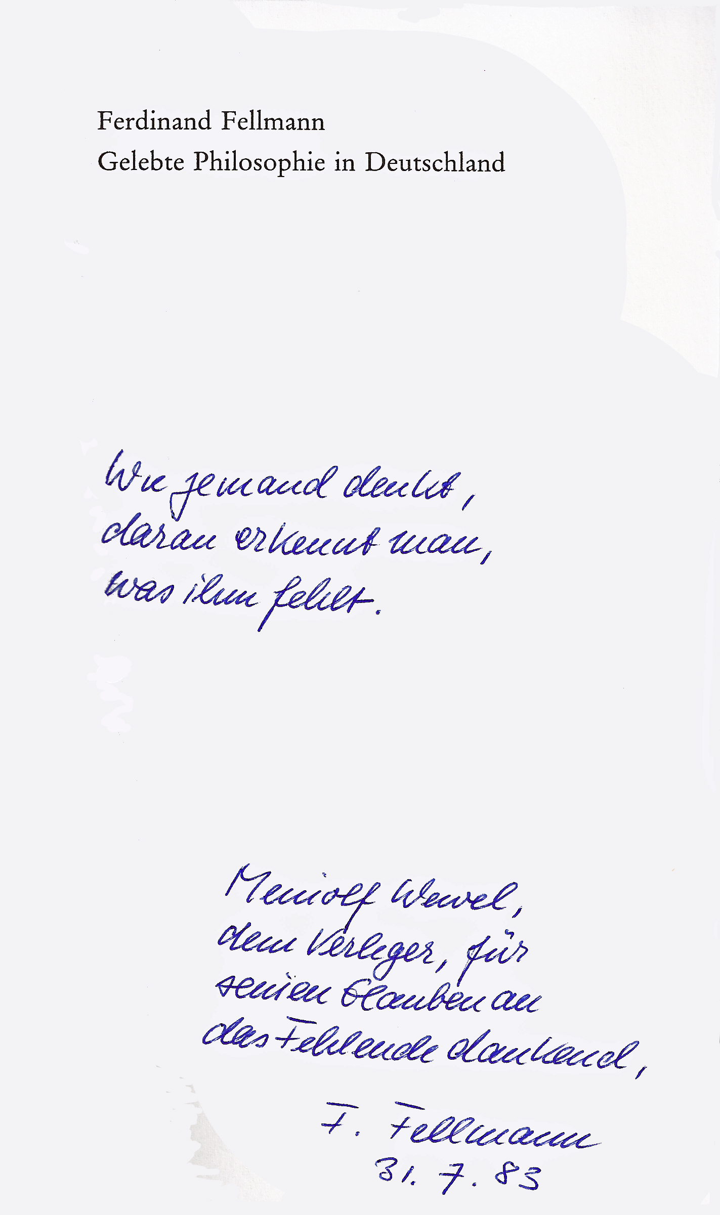 Ferdinand Fellmann. Autograph 31.7.1983. Widmung seines Buches »Gelebte Philosophie in Deutschland«